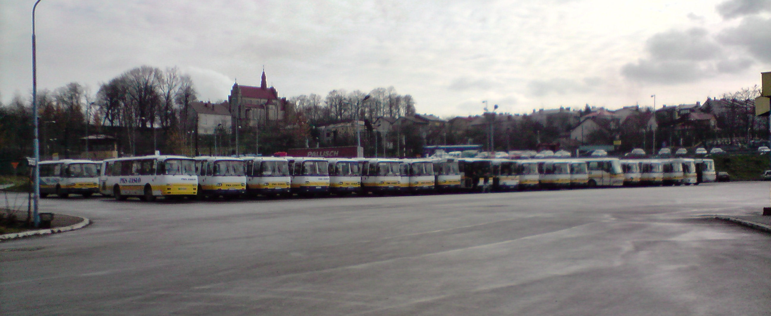 Plac dworca PKS w Jaśle, w tle "Górka Klasztorna" z kościołem sióstr Wizytek w Jaśle